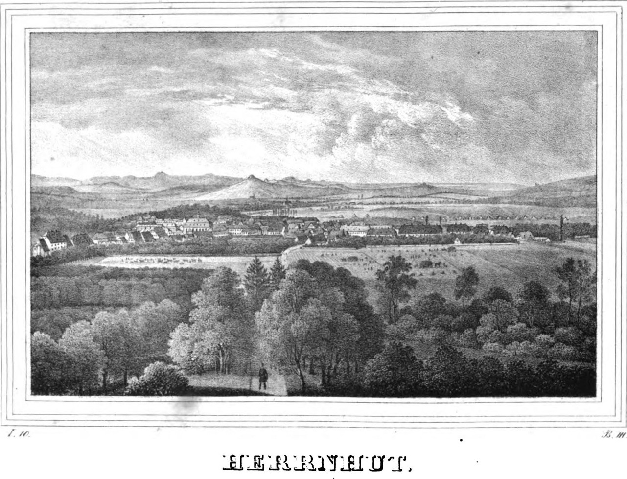 Saxonia Museum für saechsische Vaterlandskunde. Band 1. Dresden: Pietzsch und Comp. Siehe File:Saxonia Museum für saechsische Vaterlandskunde I.djvu